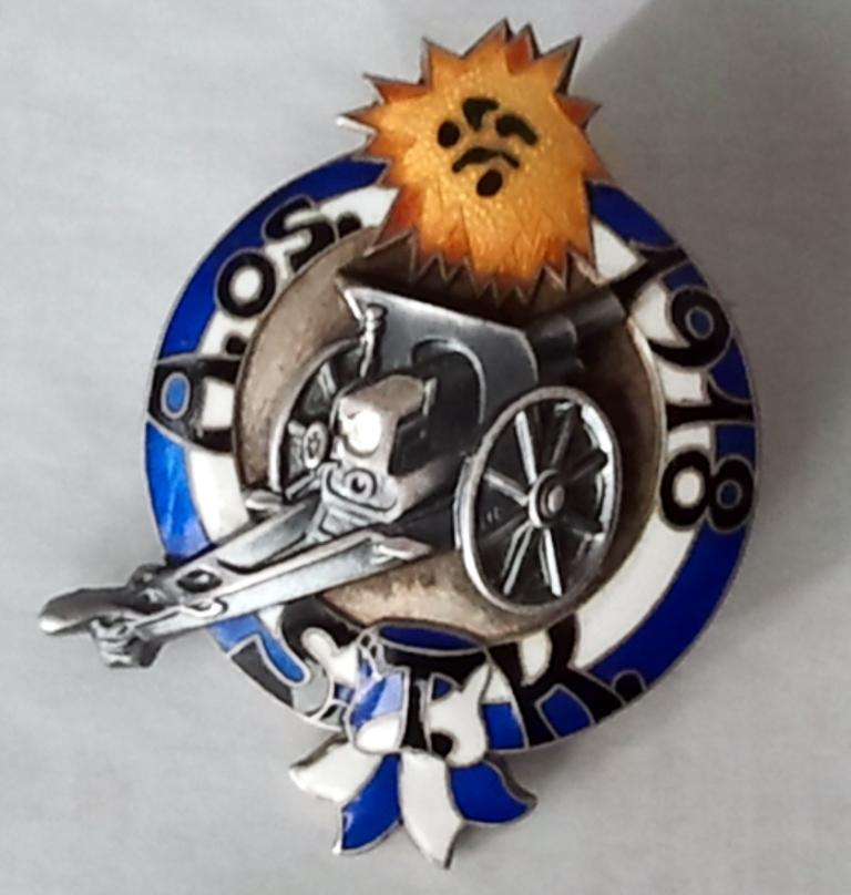 Suomen Tykistökoulun (S.T.K.) A-osaston merkki vuodelta 1918.